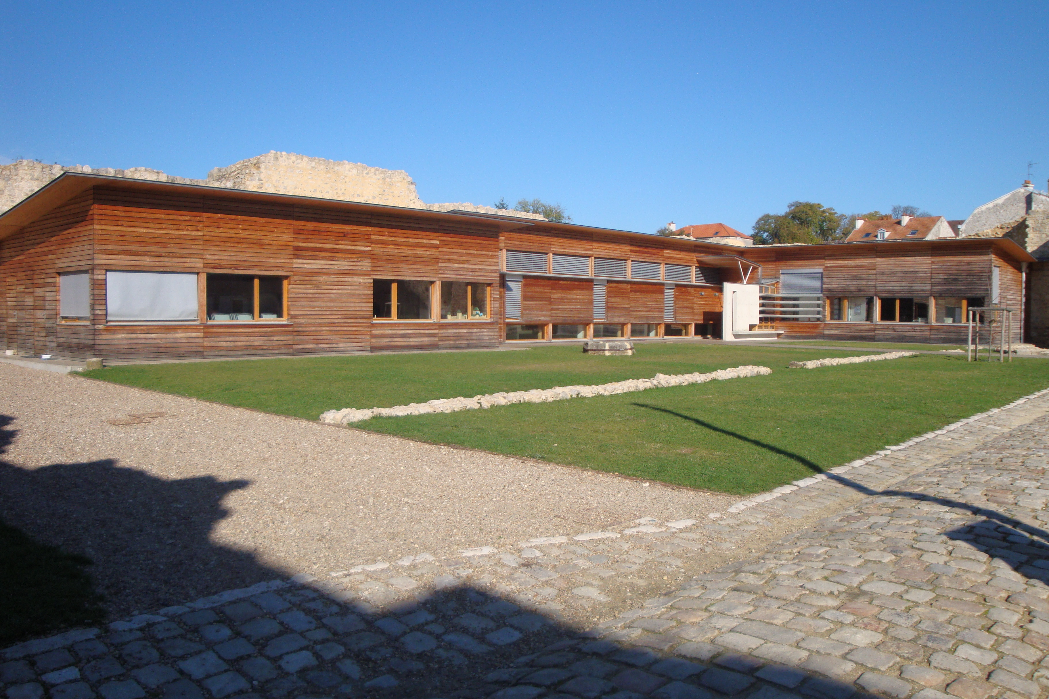 Musée du Château de Brie-Comte-Robert